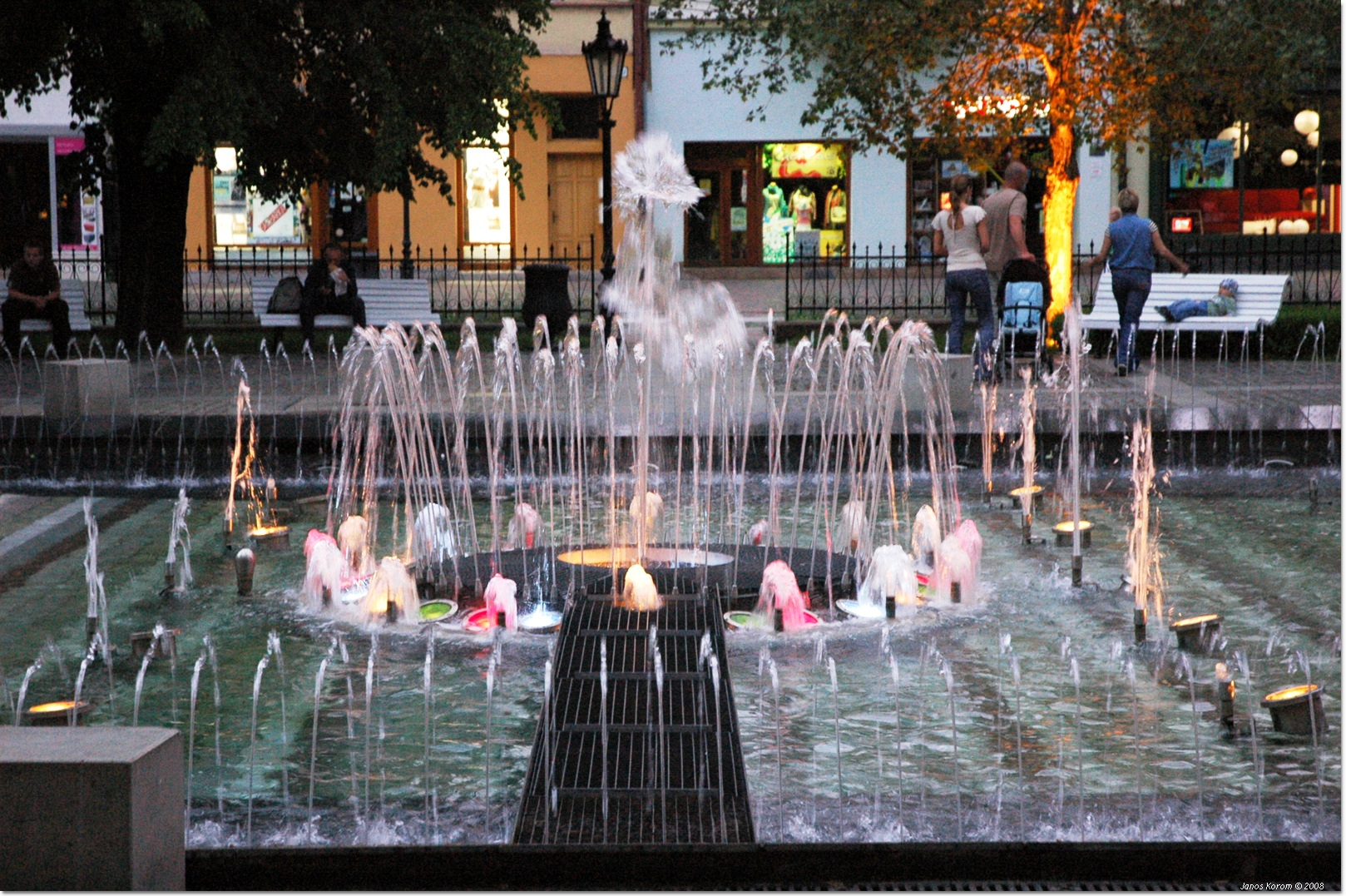 Košice - Spievajúca fontána v parku pri Dóme sv. Alžbety